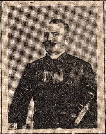 Bodnár Ernő főszolgabíró